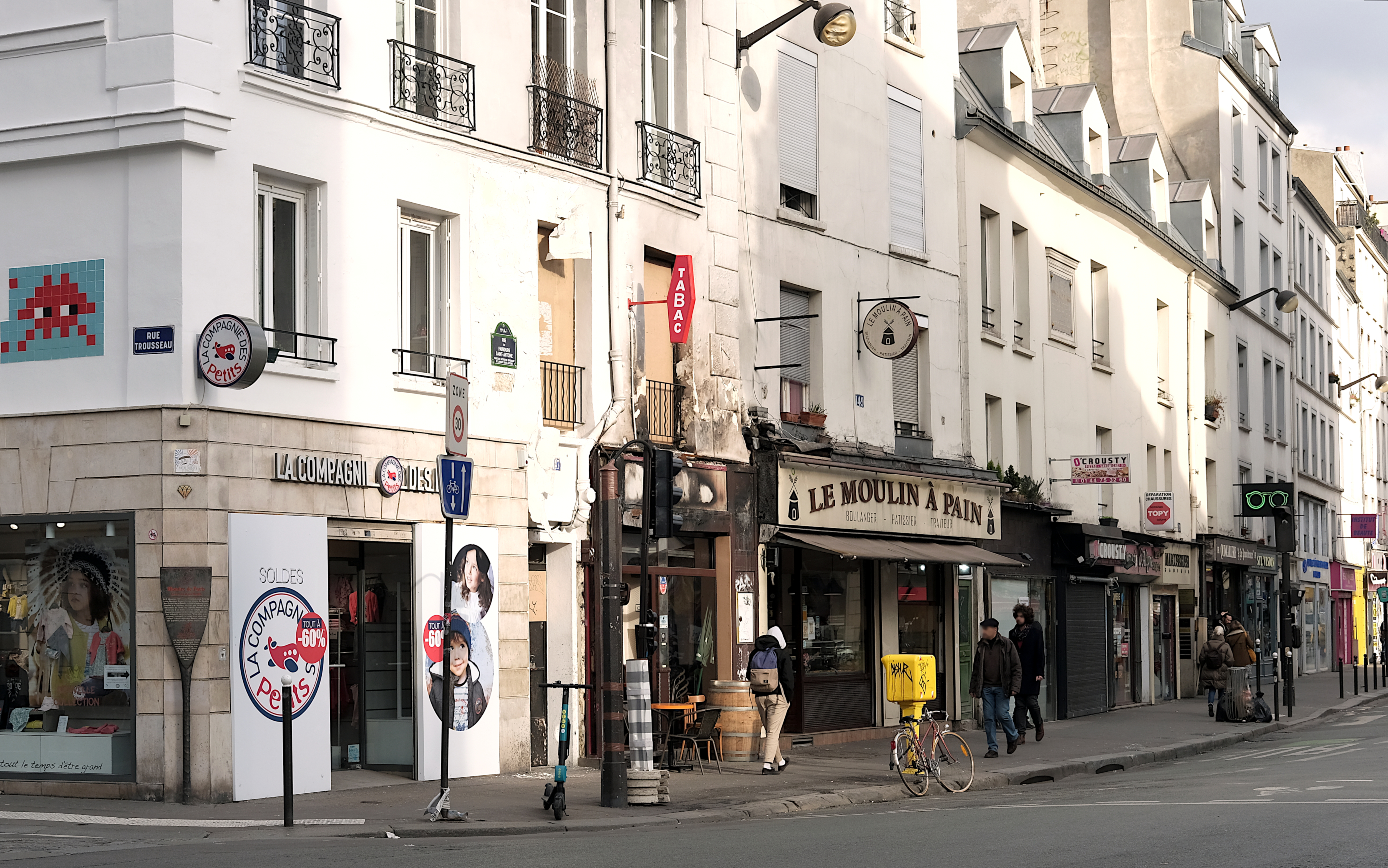 Paris XI - Angle des rues Trousseau et du Faubourg-Saint-Antoine avec un panneau Histoire de Paris (mort du député Baudin).